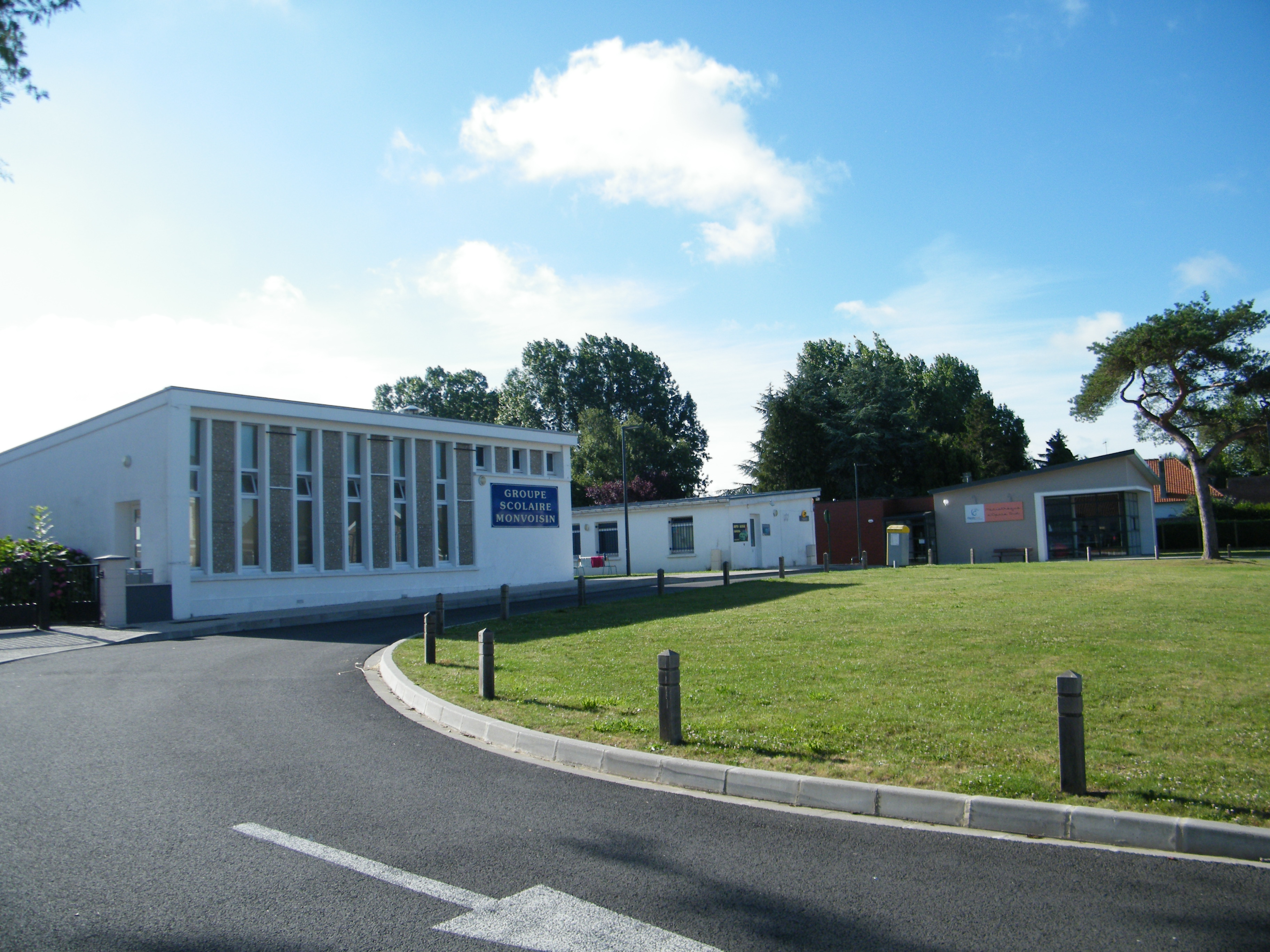 Groupe scolaire Monvoisin de Conchil-le-Temple, Pas-de-Calais, France